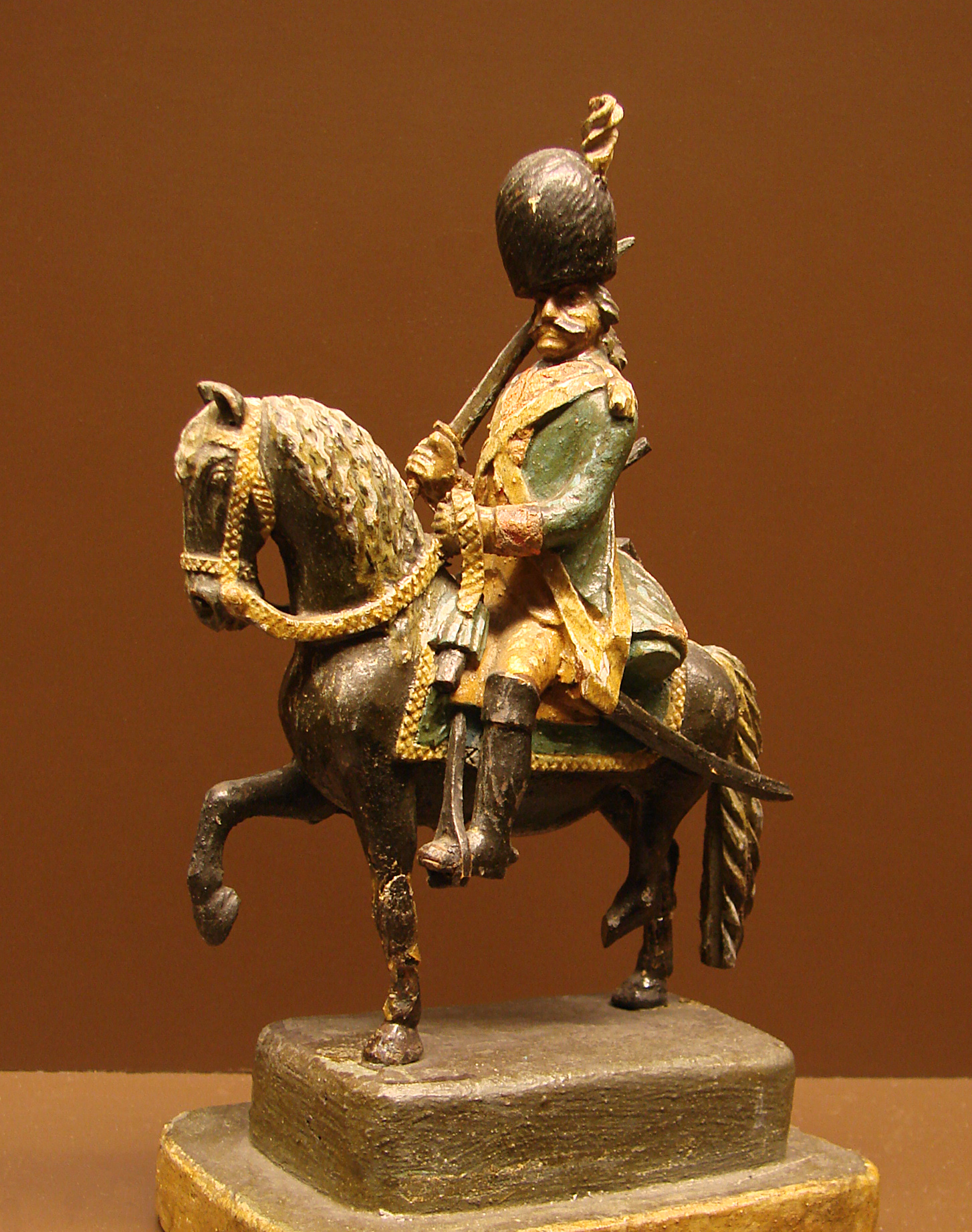 Figurine de bois polychrome par Jean-Baptiste Clémence (Paris; 1743-1801):carabinier.Musée de la figurine historique à Compiègne.